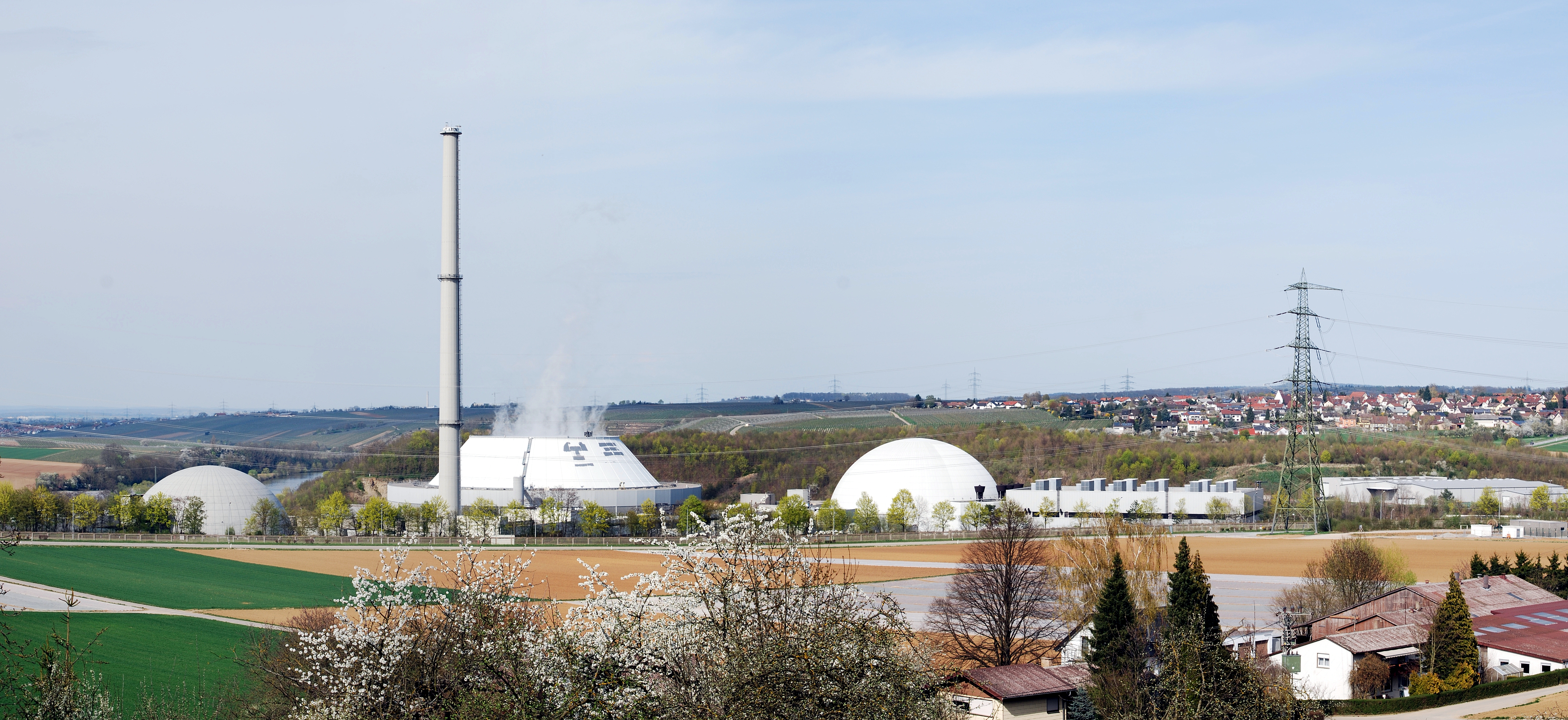 Das Kernkraftwerk Neckarwestheim, vier Teile zum Stitchen.